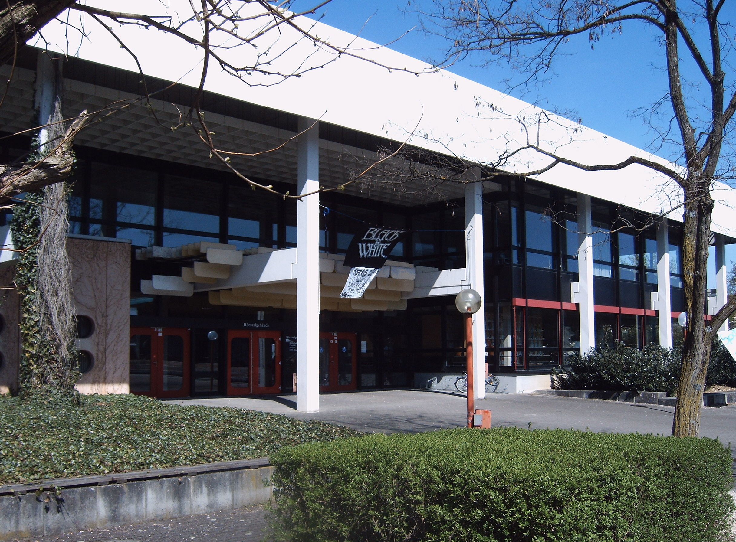 Hörsaalgebäude der PH Schwäbisch Gmünd